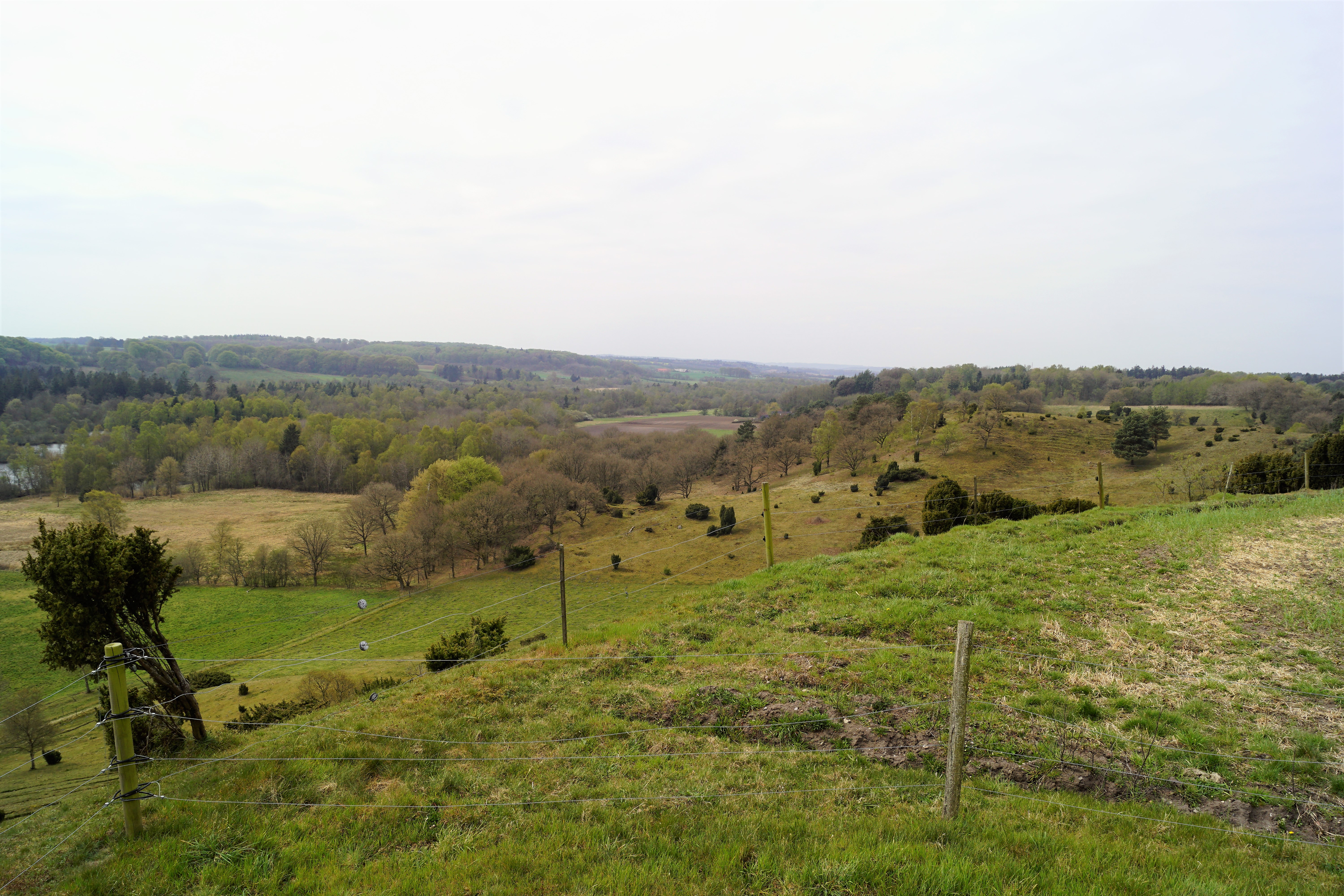 De fredede Læsten Bakker vest for Randers